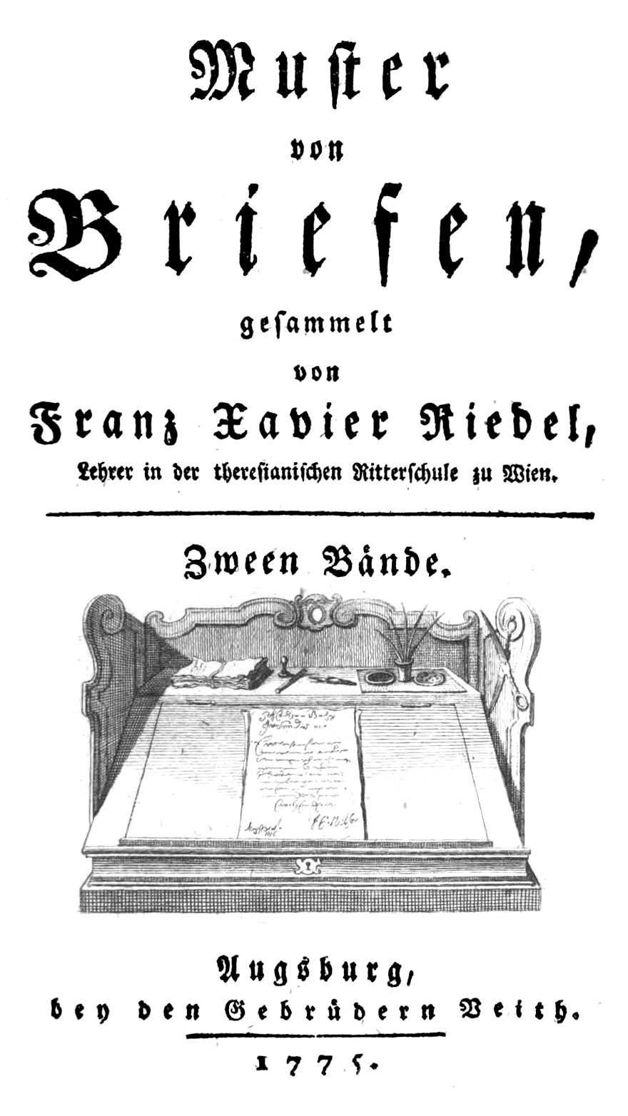 Franz Xaver Riedel: Muster von Briefen, Augsburg 1775, Titelseite